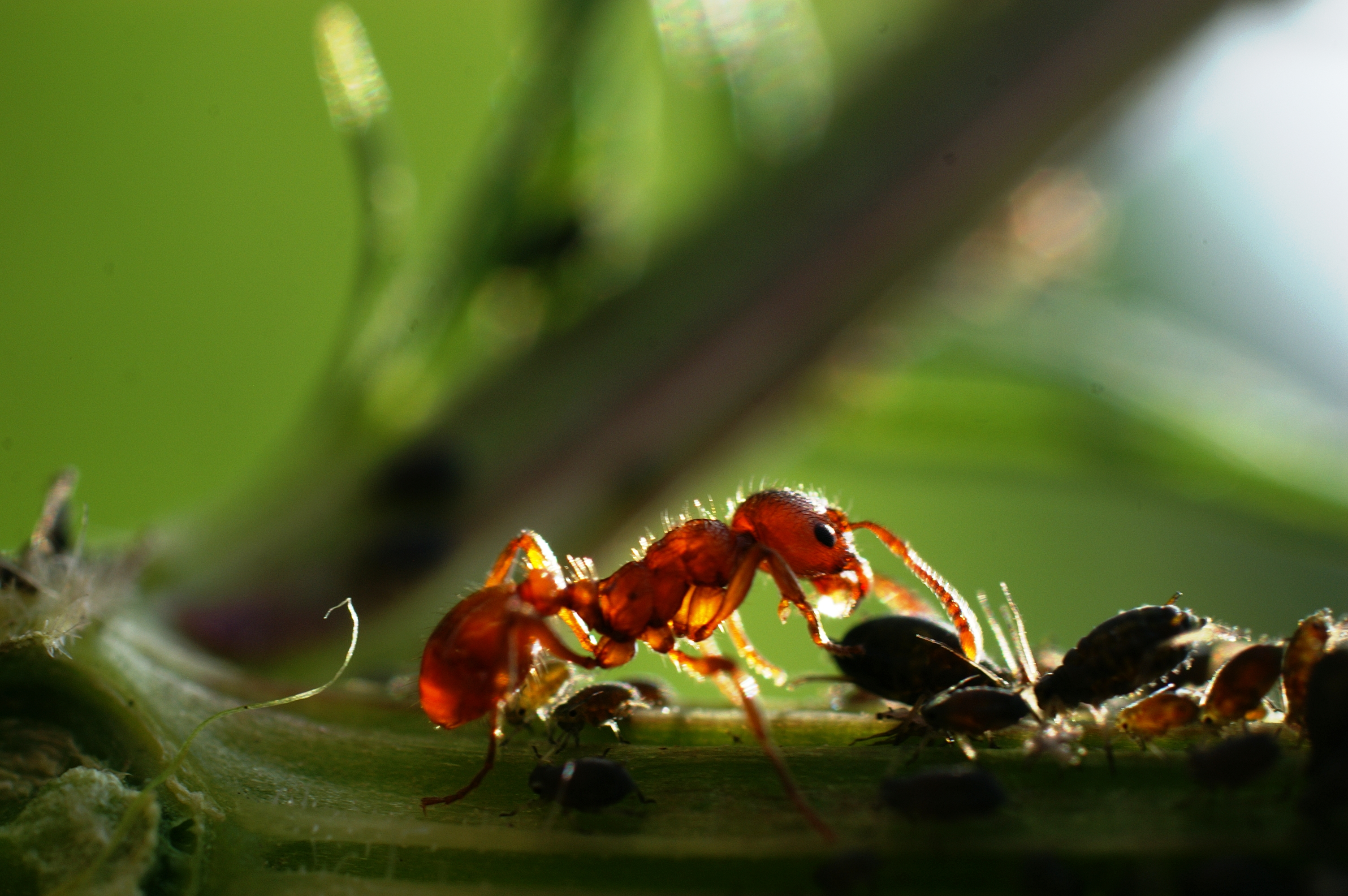 melkende Ameise Honigtau